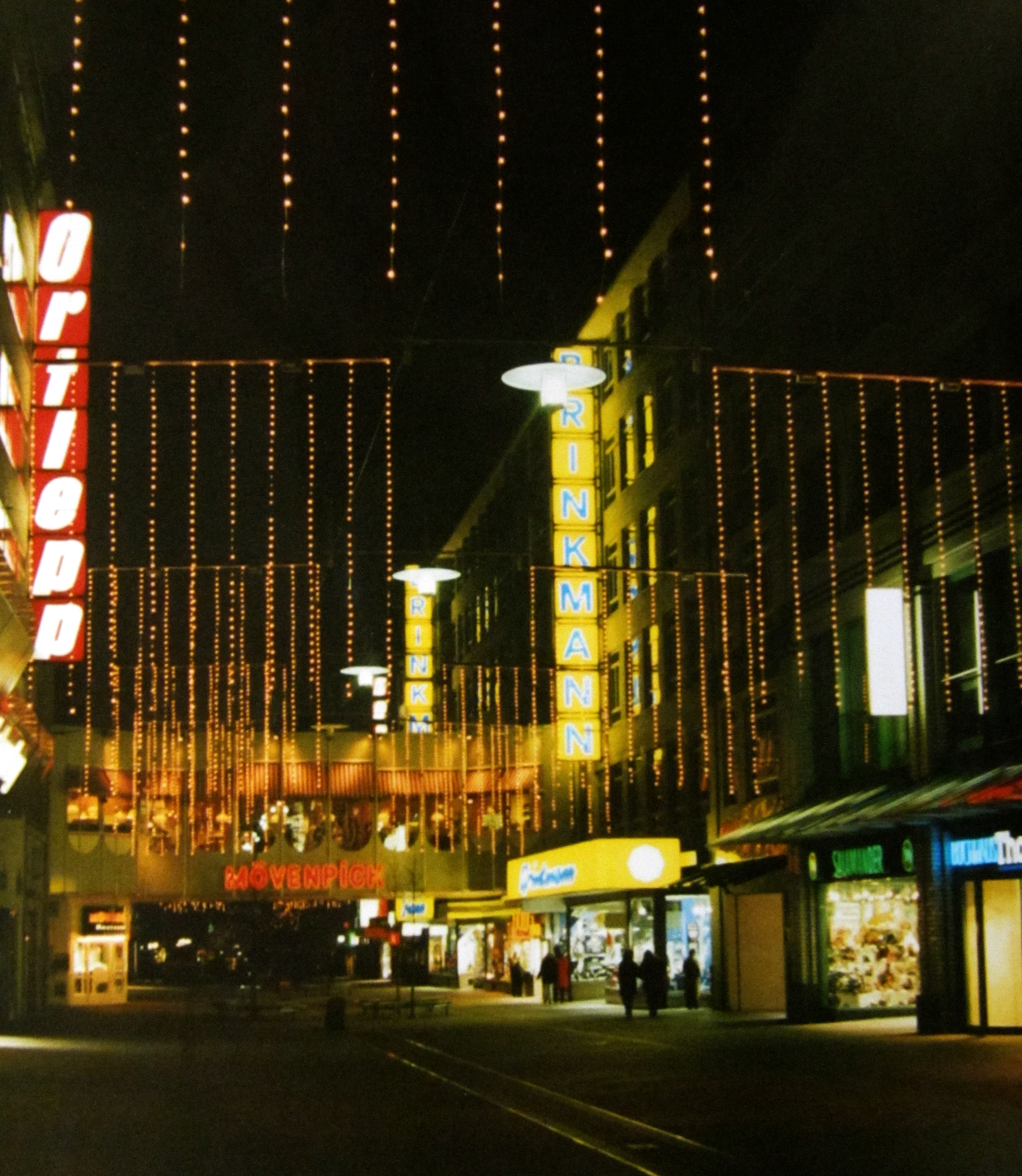 Spitalerstraße in Hamburg bei Nacht (2)